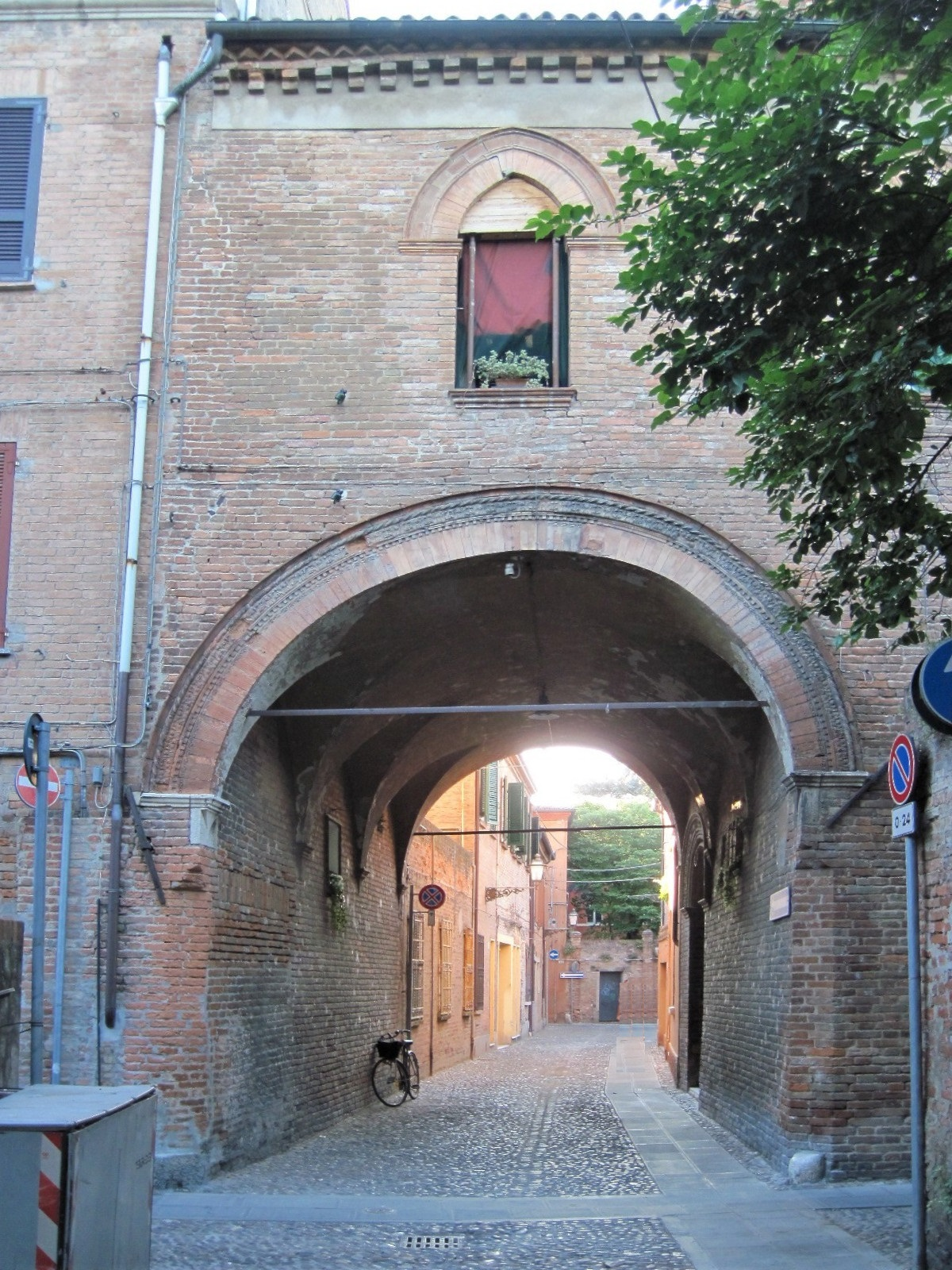 Volto su via Coperta